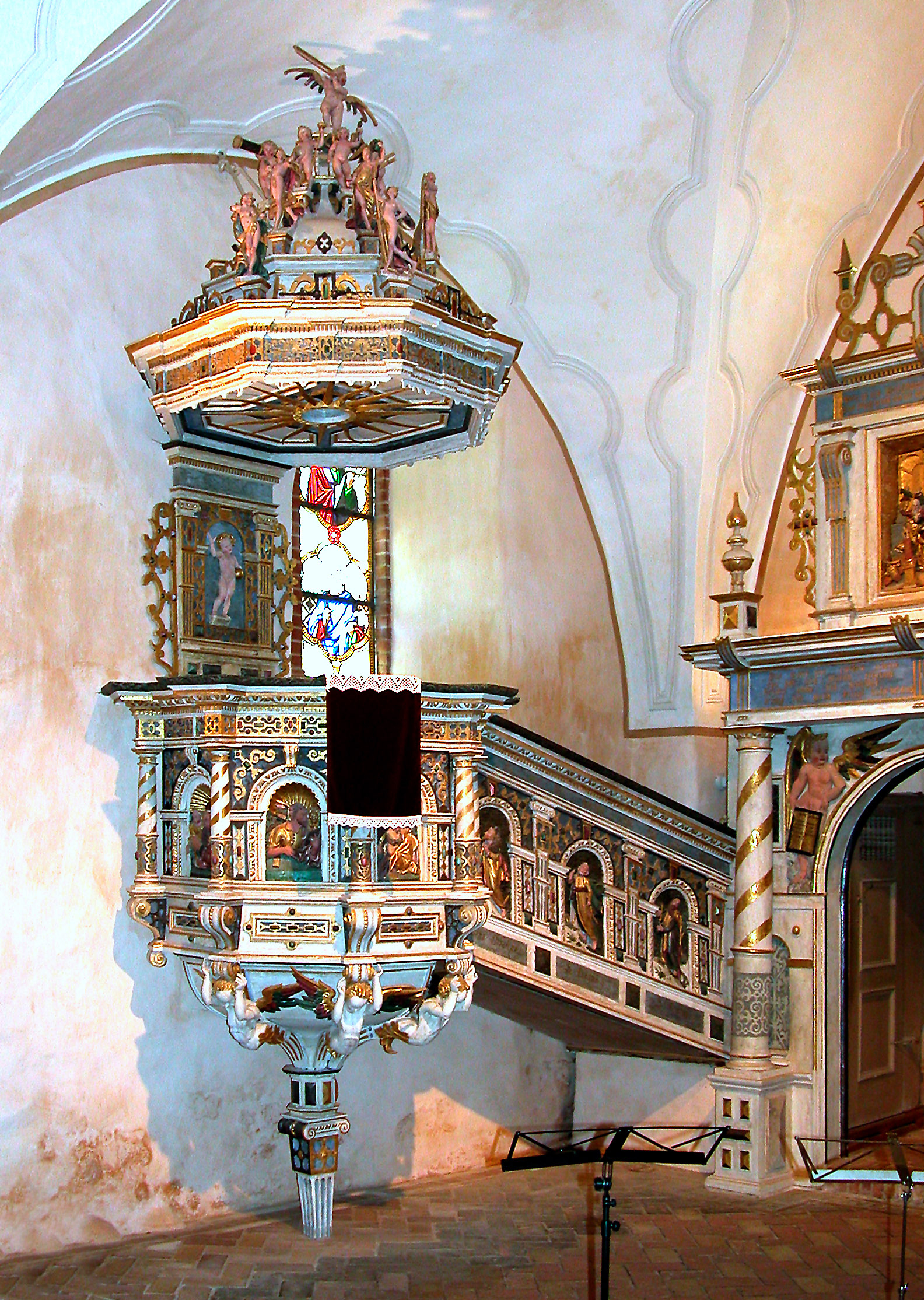 05.07.2003 17166 Bristow (Schorssow), Dörpstrat (GMP: 53.712304,12.623837): Die Dorfkirche wurde 1597-1601 als schlichte Kapelle erbaut und später im Stil der Renaissance erweitert. Älteste protestantische Dorfkirche Mecklenburgs. Kanzel um 1600. [DSCN]20030705720DR.JPG(c)Blobelt